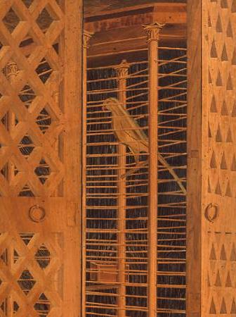 Stdiolo di guidobaldo da montefeltro